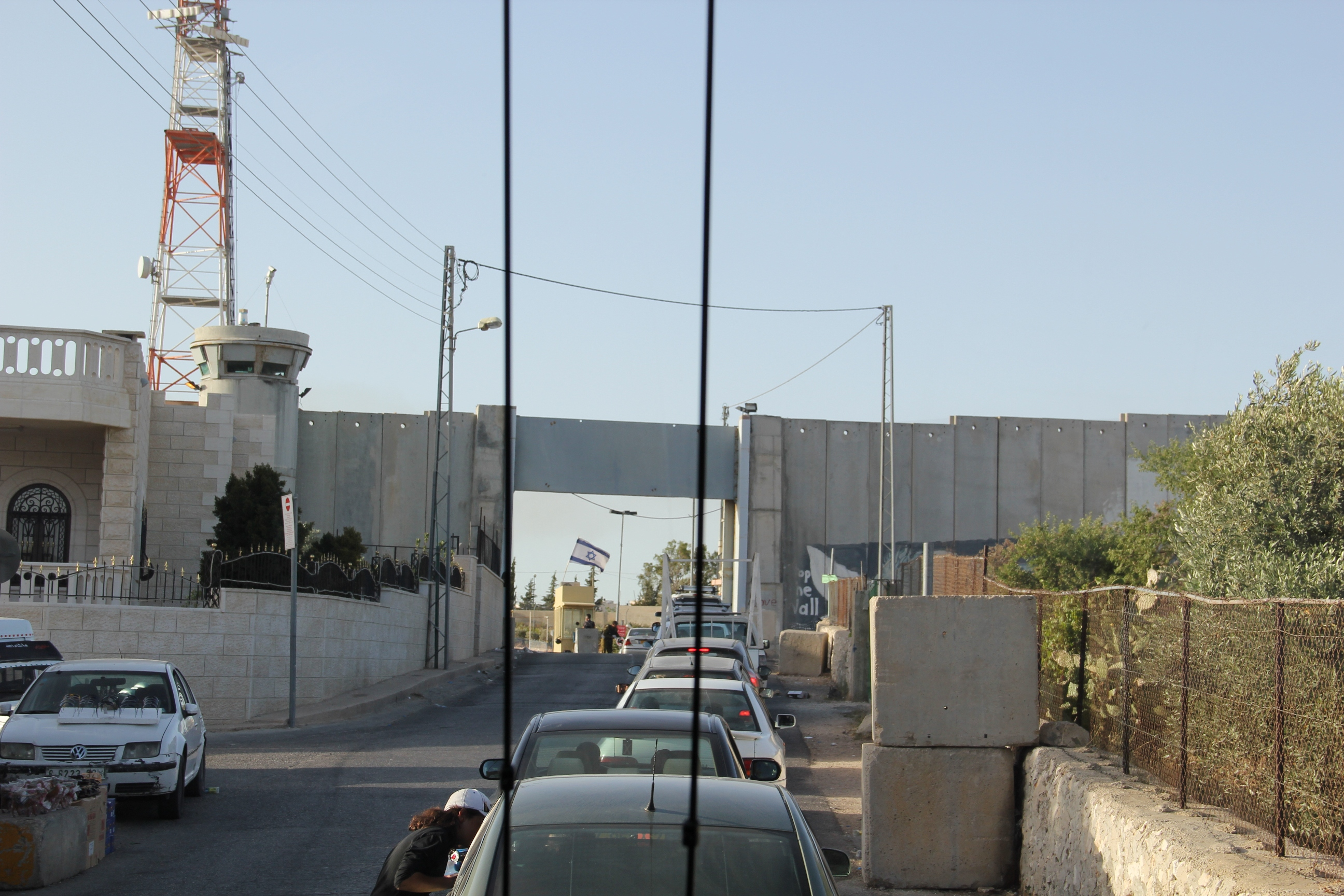 Kontrollstelle zwischen Israel und Bethlehem